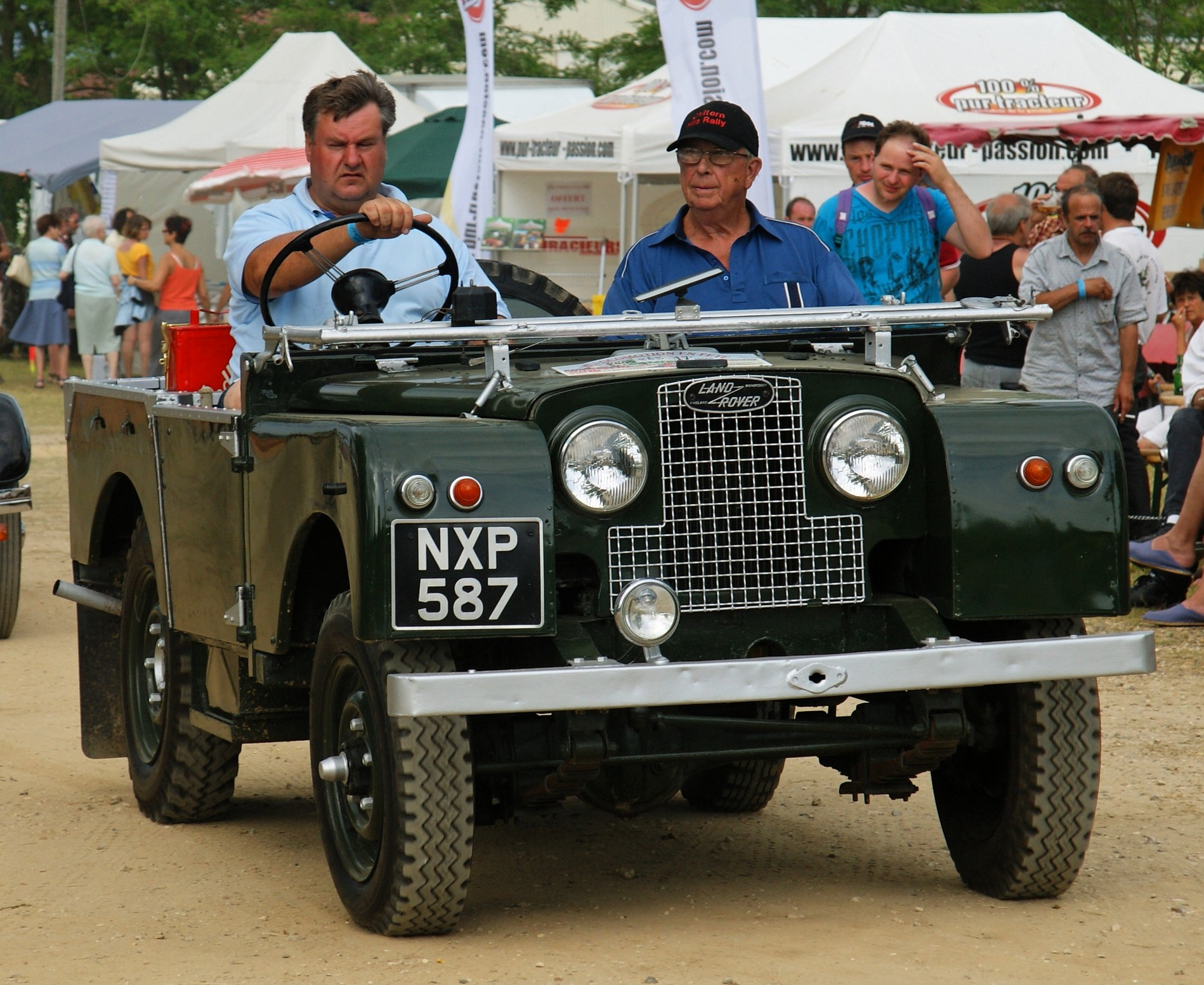 La locomotion en Fête 2009 / 1948 Land Rover Series I